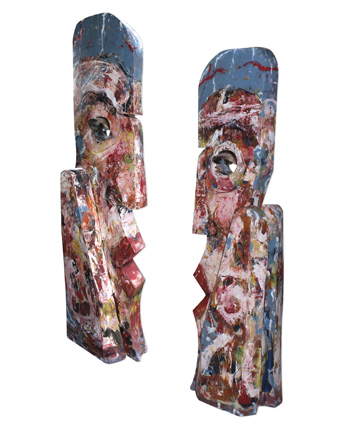 bemalte Holzskulpturen des Künstlers Lutz Bernsau